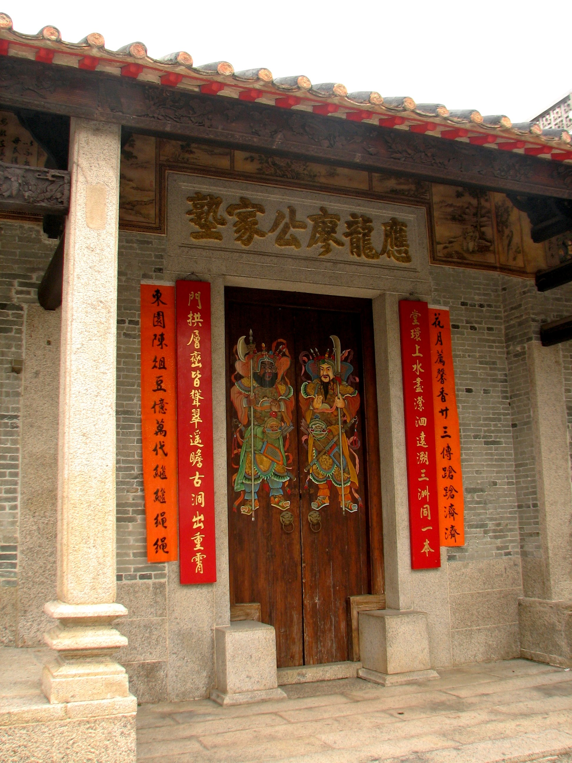 Liu Ying Lung Study Hall, Po Sheung Tsuen, Sheung Shui Wai, Sheung Shui, N.T.